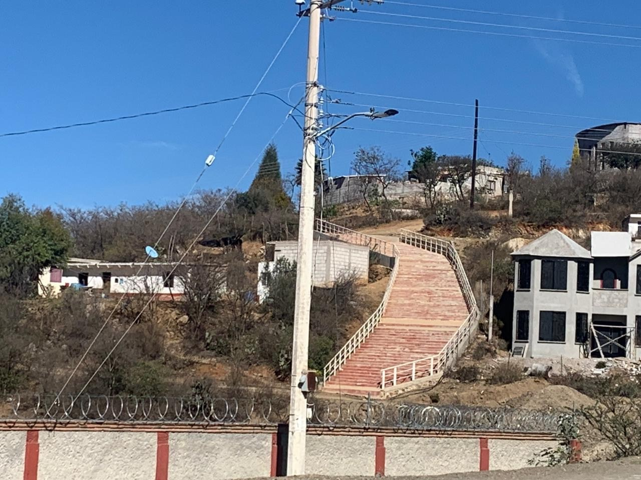 Imagen en la cual se ven dos viviendas que se encuentran en la localidad de Charape de los Pelones, situada en el Estado de Querétaro.